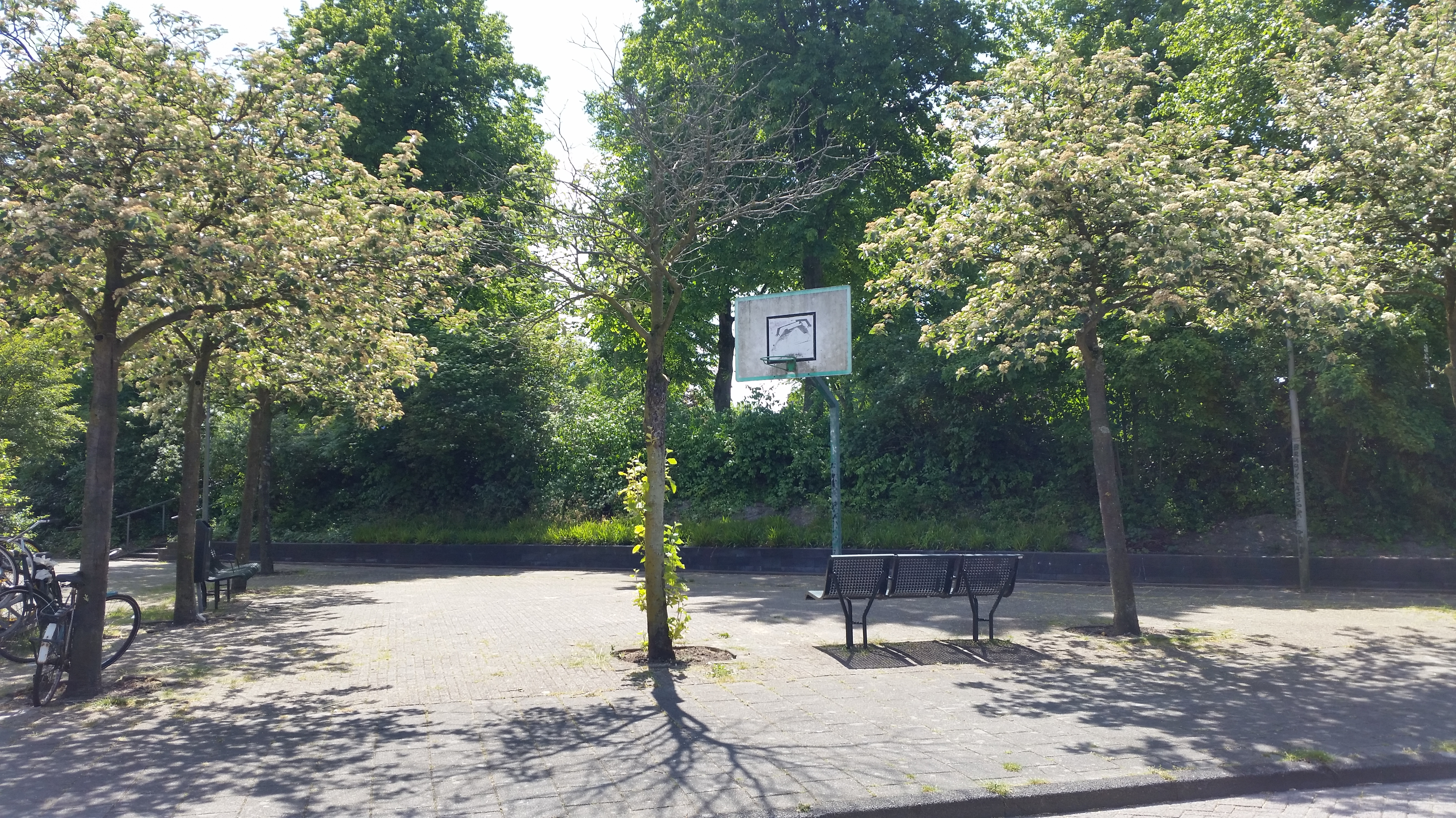 Impressie van de Bart de Ligtstraat, Amsterdam-oost (mei 2020)